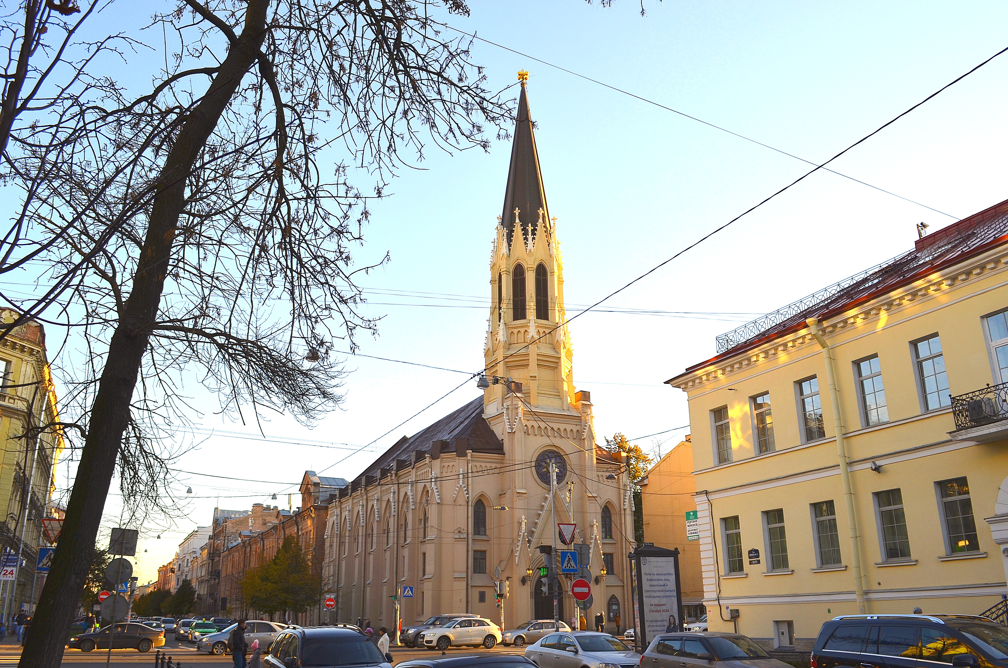 Евангелическо-лютеранская церковь Святого Михаила (Санкт-Петербург и Лен.область, Санкт-Петербург, Средний пр., 18)